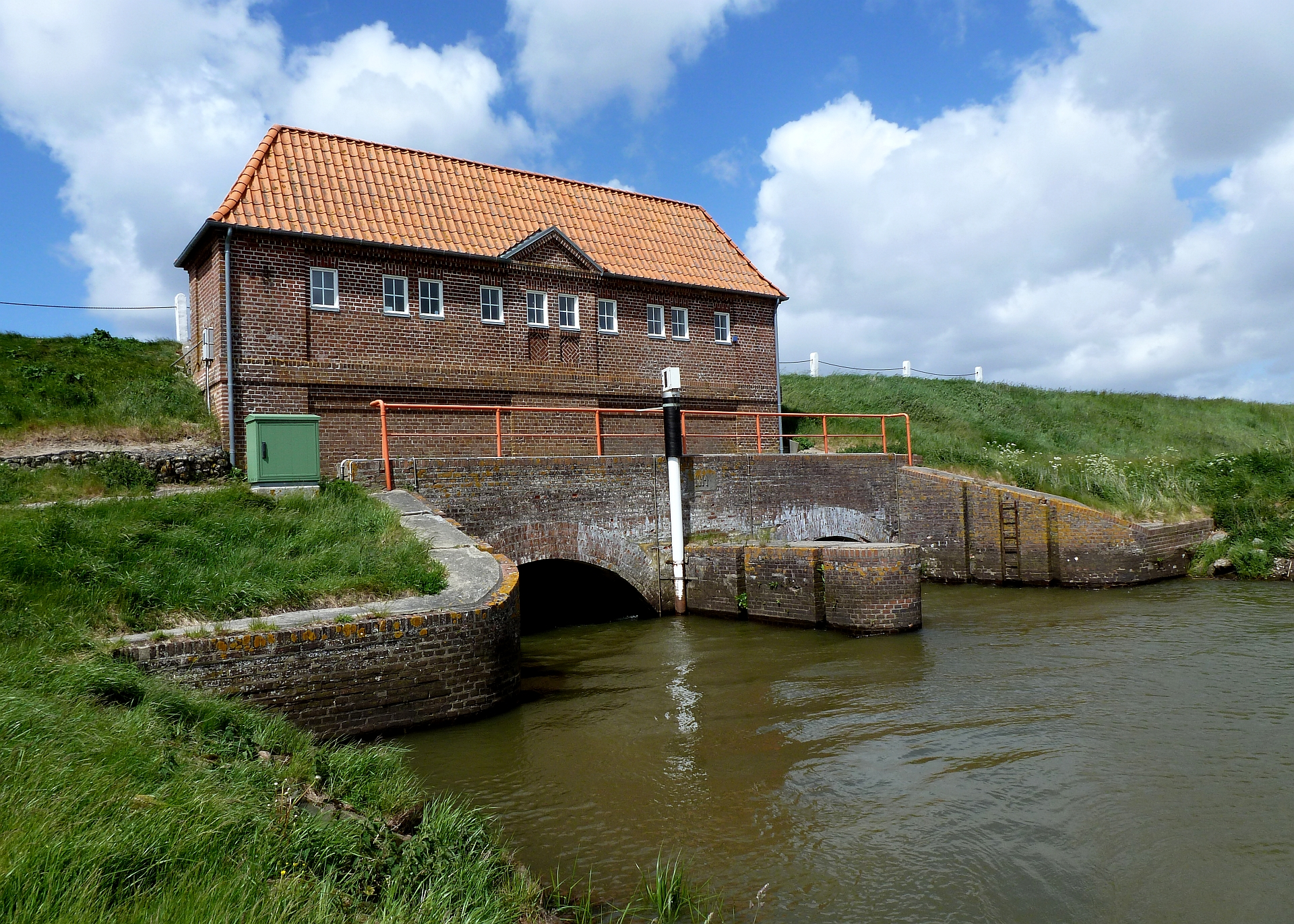 Ballum Sluse (Ballum Schleuse), Baubeginn 1914, Fertigstellung 1915. Konstrukteur Deichbauingenieur Hinrichs, ausführende Firma Philipp Holzmann & Co. Der Deichbau verzögerte sich wegen des Weltkrieges I und dauerte von 1914 bis 1919. Aufnahmedatum 2011-05.